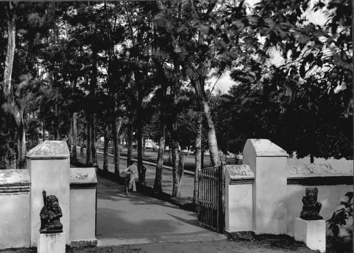 Foto. Herinnering aan het bezoek van Z.E. den Gouverneur Generaal Mr. D. Fock aan Lombok 6/8 April 1925. De ingang naar de Majoera in Tjakanegara op het eiland Lombok.